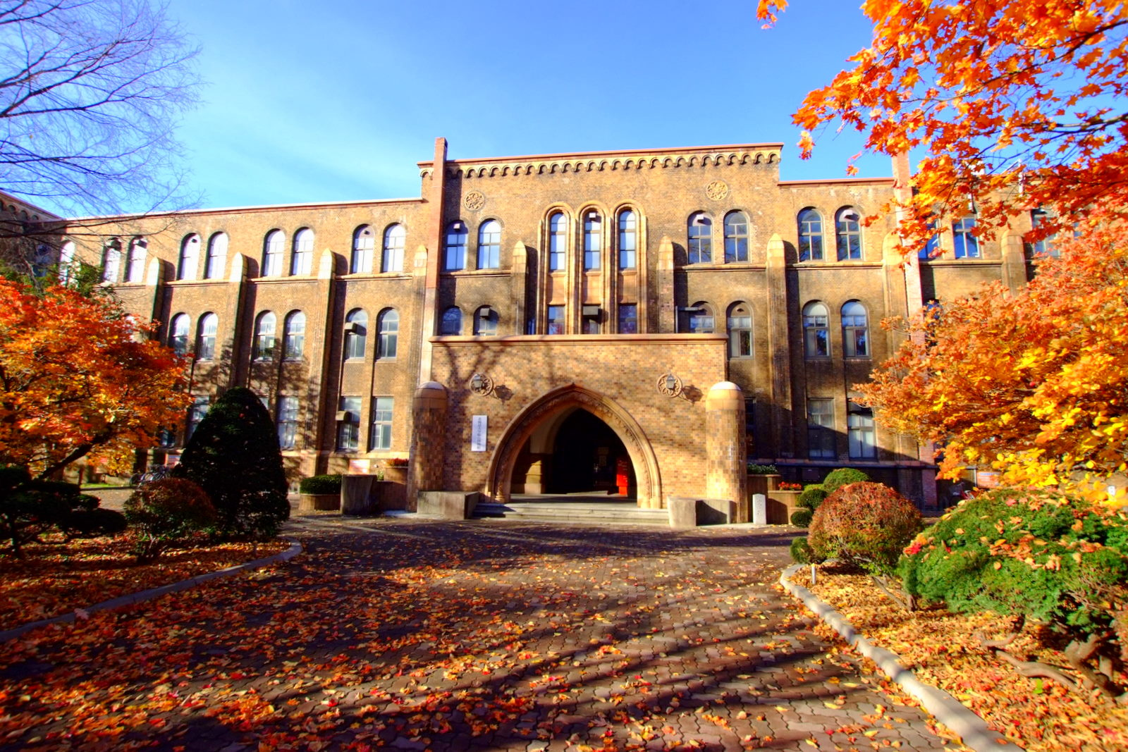 北海道大学（Hokkaido University）